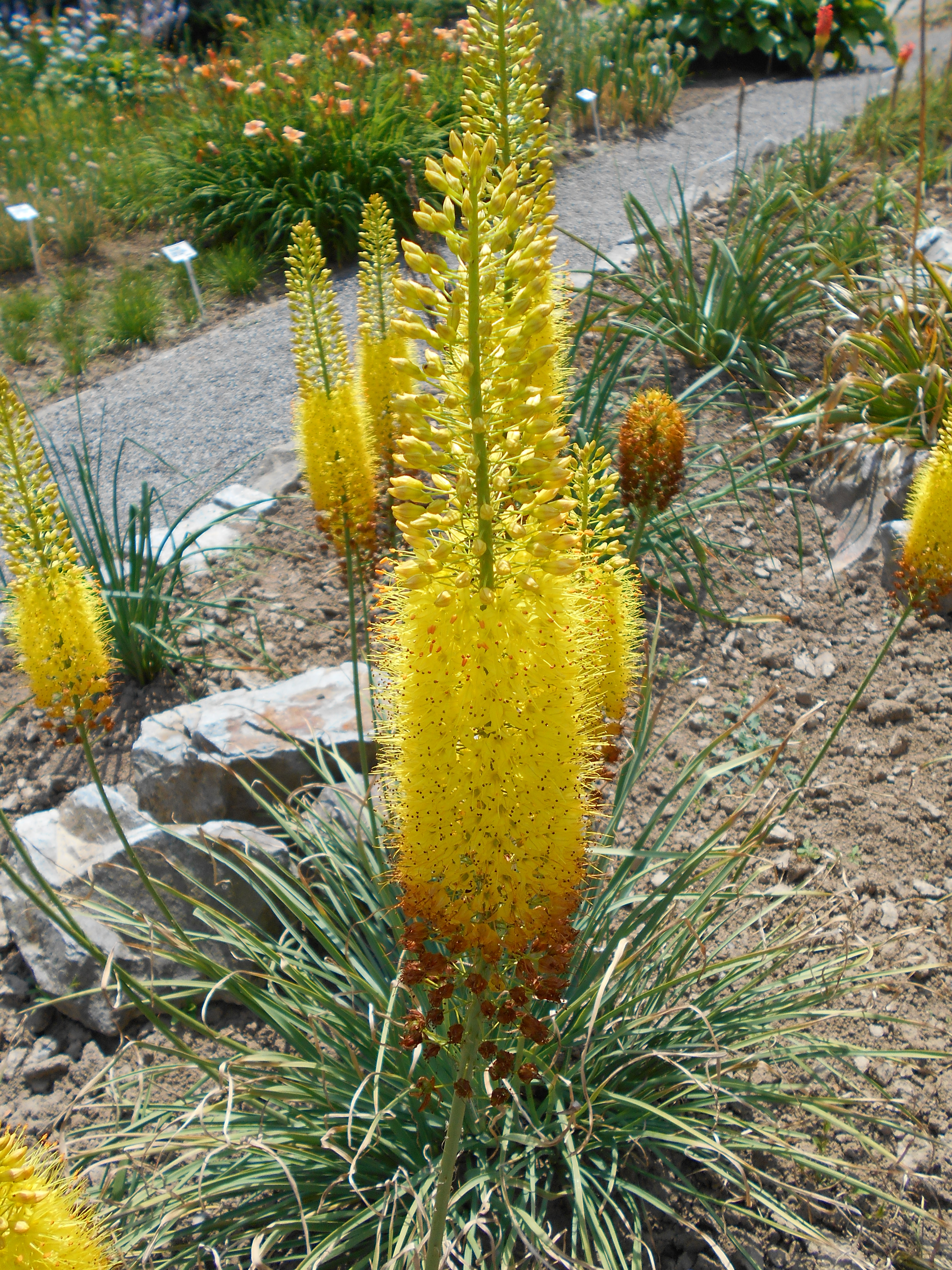 Pustynnik wąskolistny (Eremurus stenophyllus), Ogród Botaniczny UMCS w Lublinie.